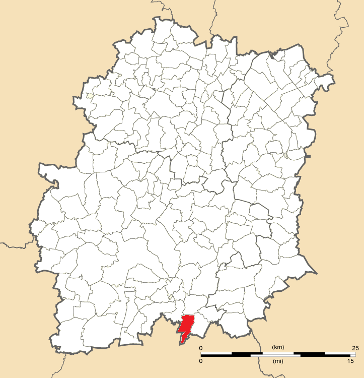 Carte de position de Blandy en Essonne (91)